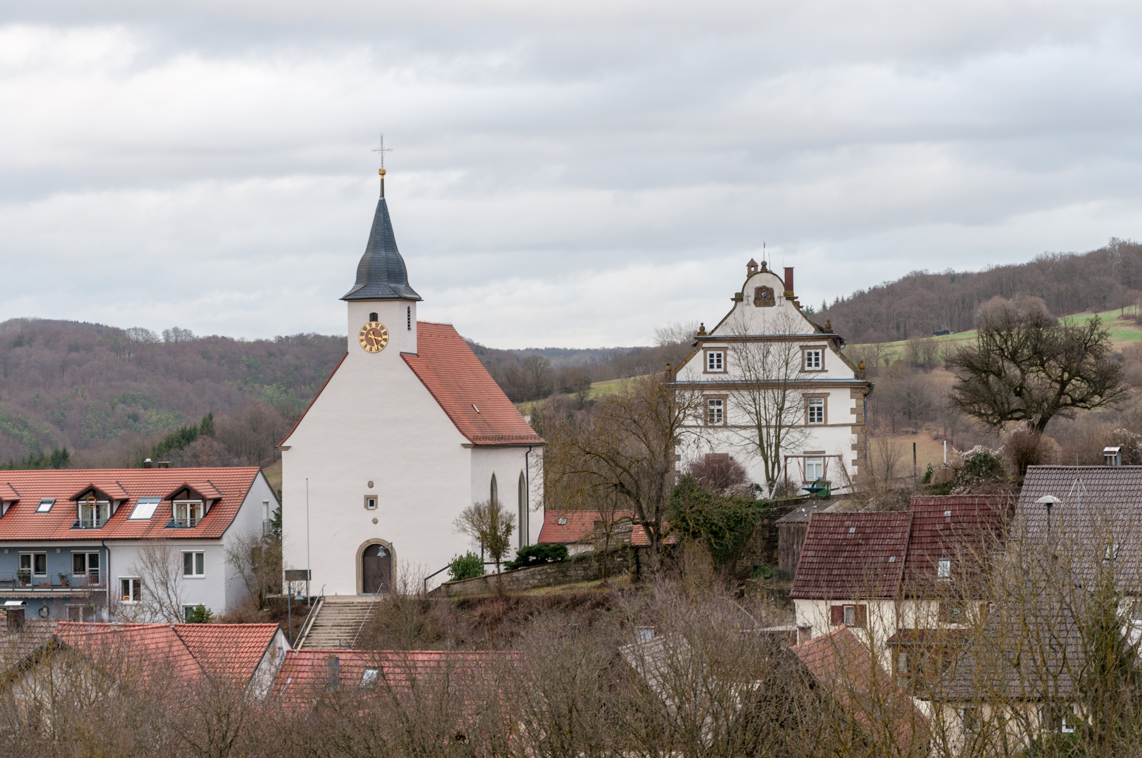 Im Mulfinger Ortsteil Jagstberg